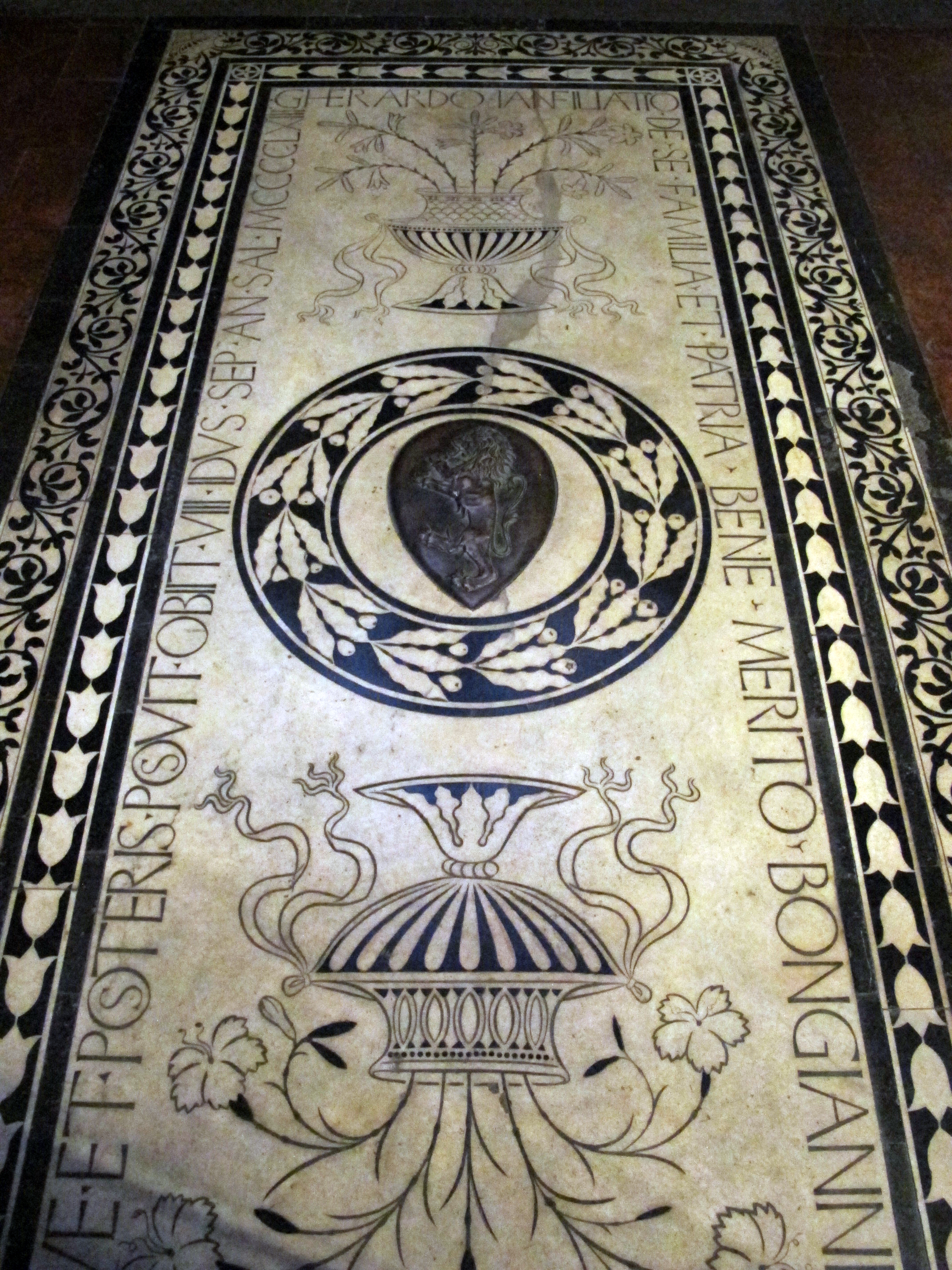 Santa Trinita, Firenze